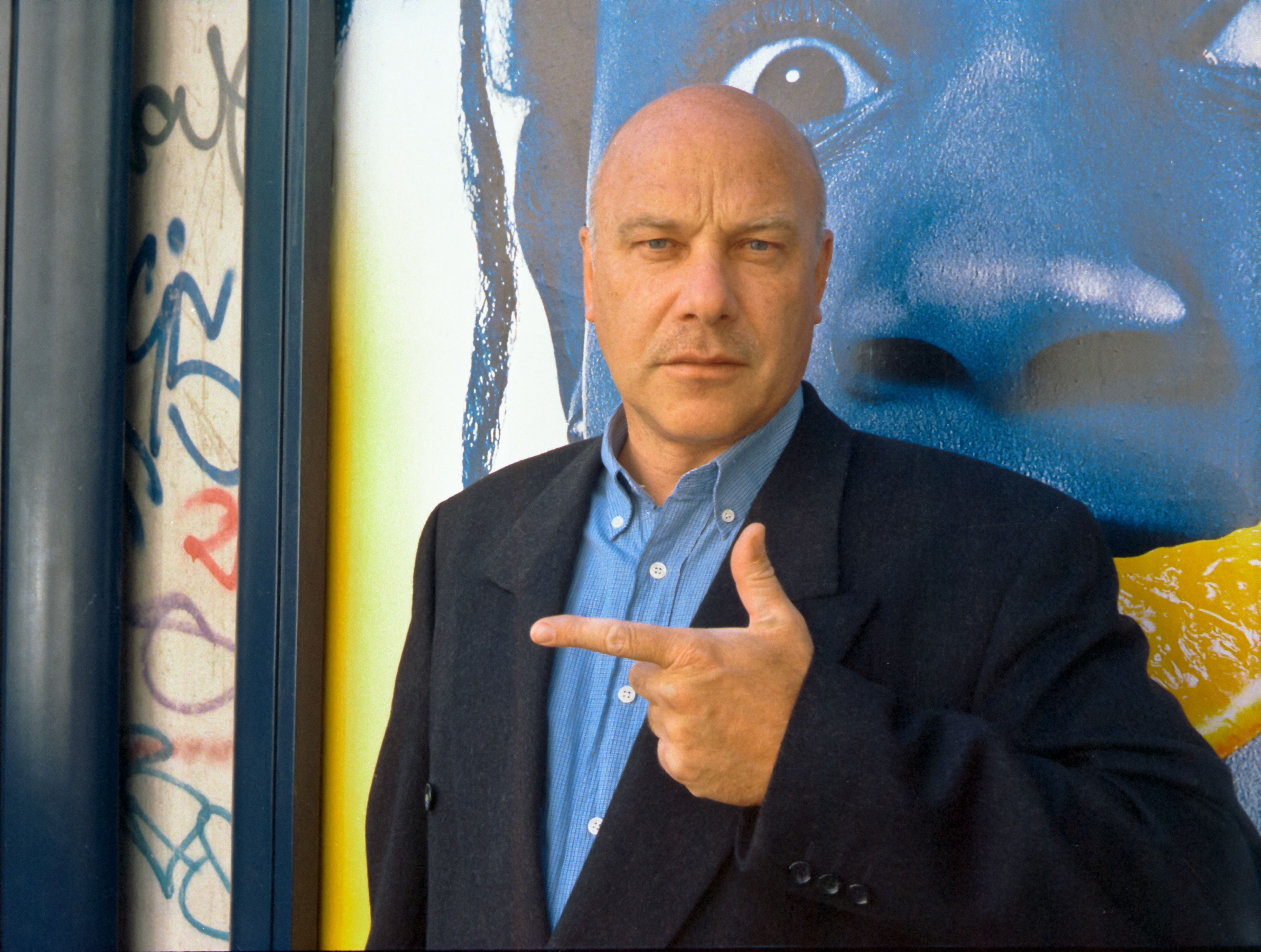 Portrait des Autors Reimer Boy Eilers. Das Handzeichen ist ein Symbol der ehemaligen Autorengruppe PENG, in welcher der Autor Mitglied war.